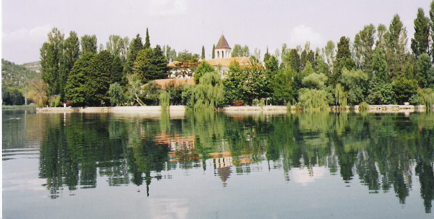 Die Klosterinsel Visovac im Krka-Nationalpark